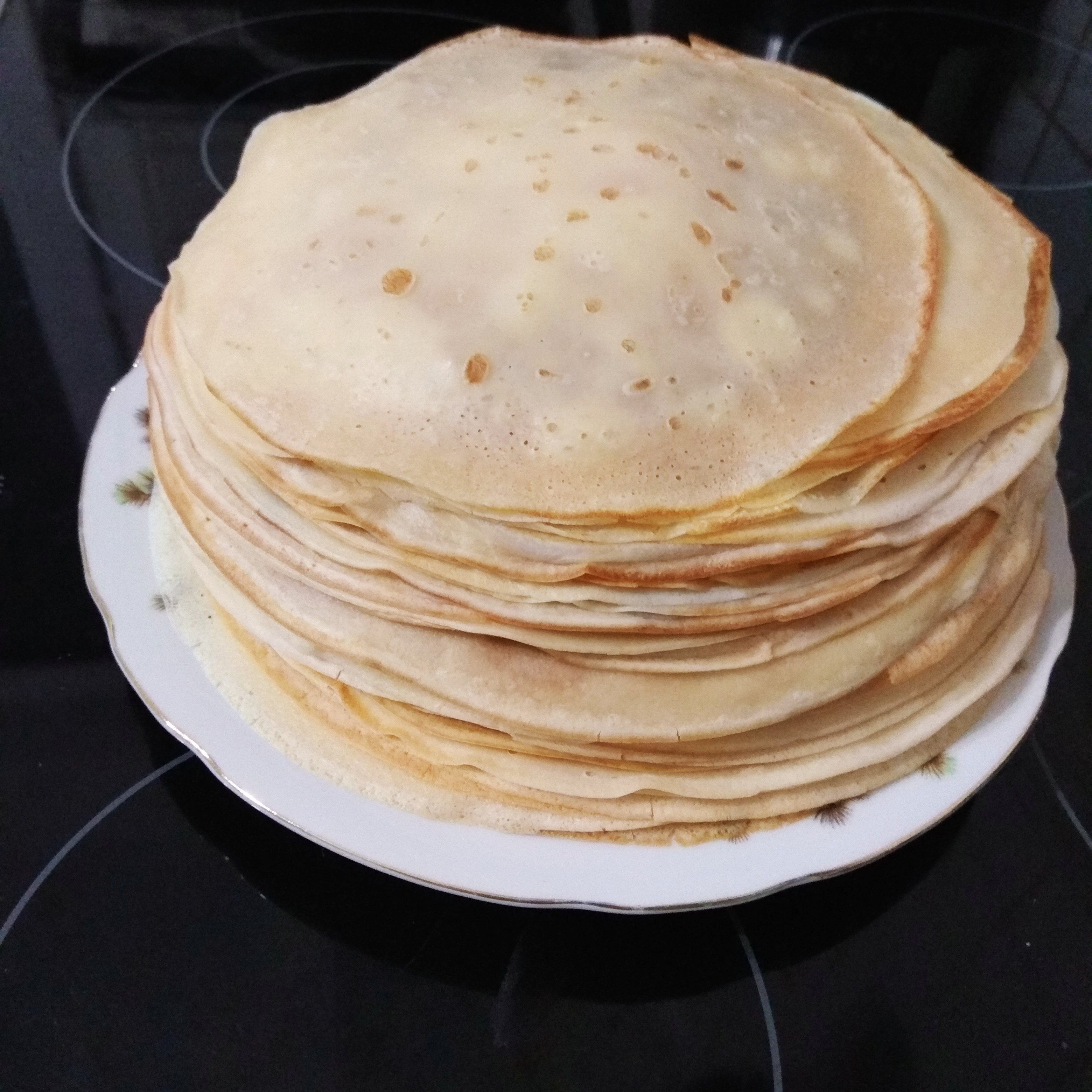 Стос з пяцідзесяці блінкоў на талерцы дыяметрам 240 мм.